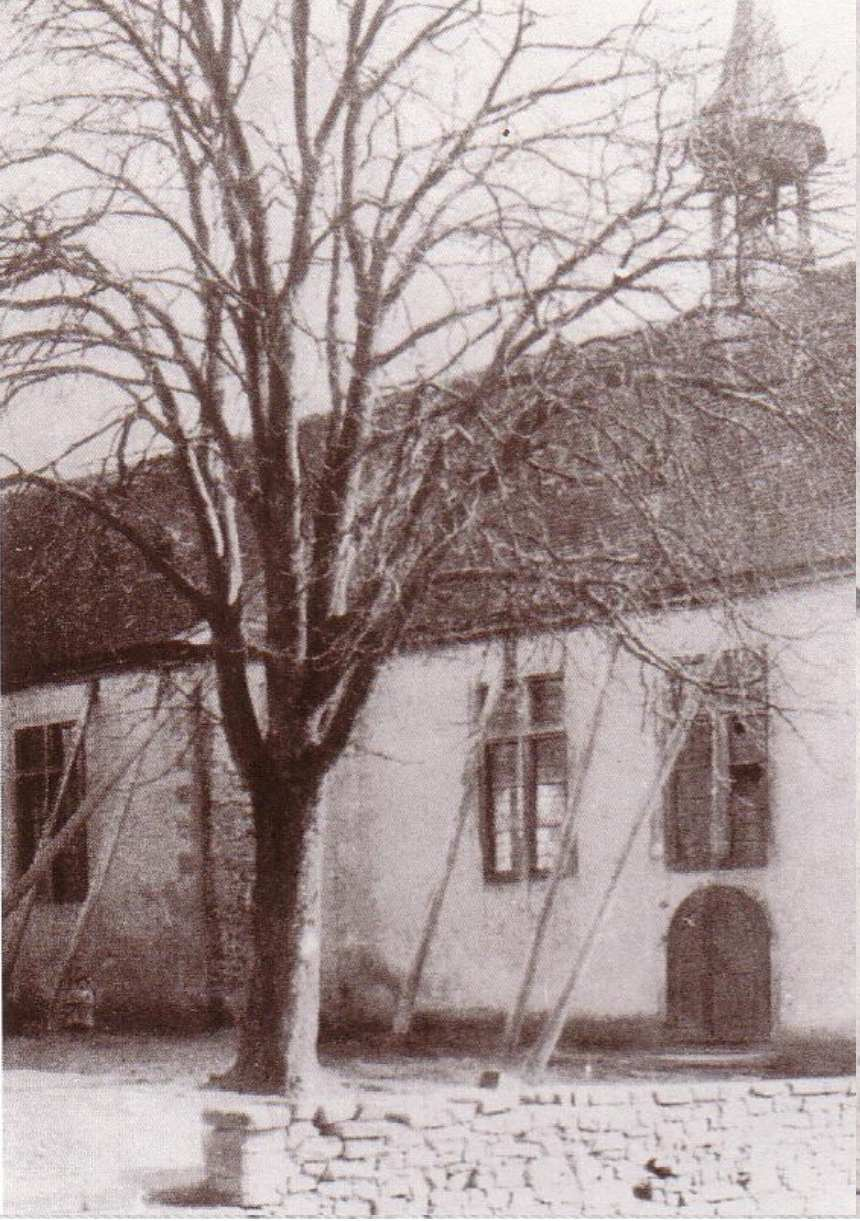 Maria Geburt Schweinheim - alte Kirche St. Alban um 1890